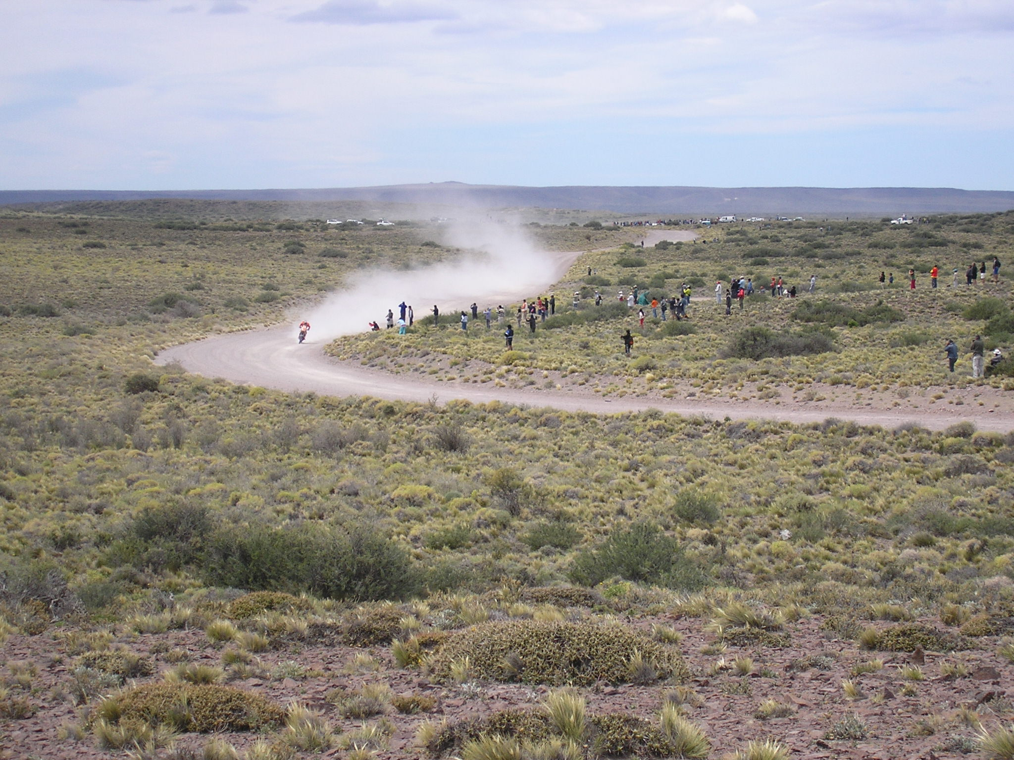 lA PRIMERA MOTO DEL RALLY DAKAR QUE ARRIBA A MAQUINCHAO